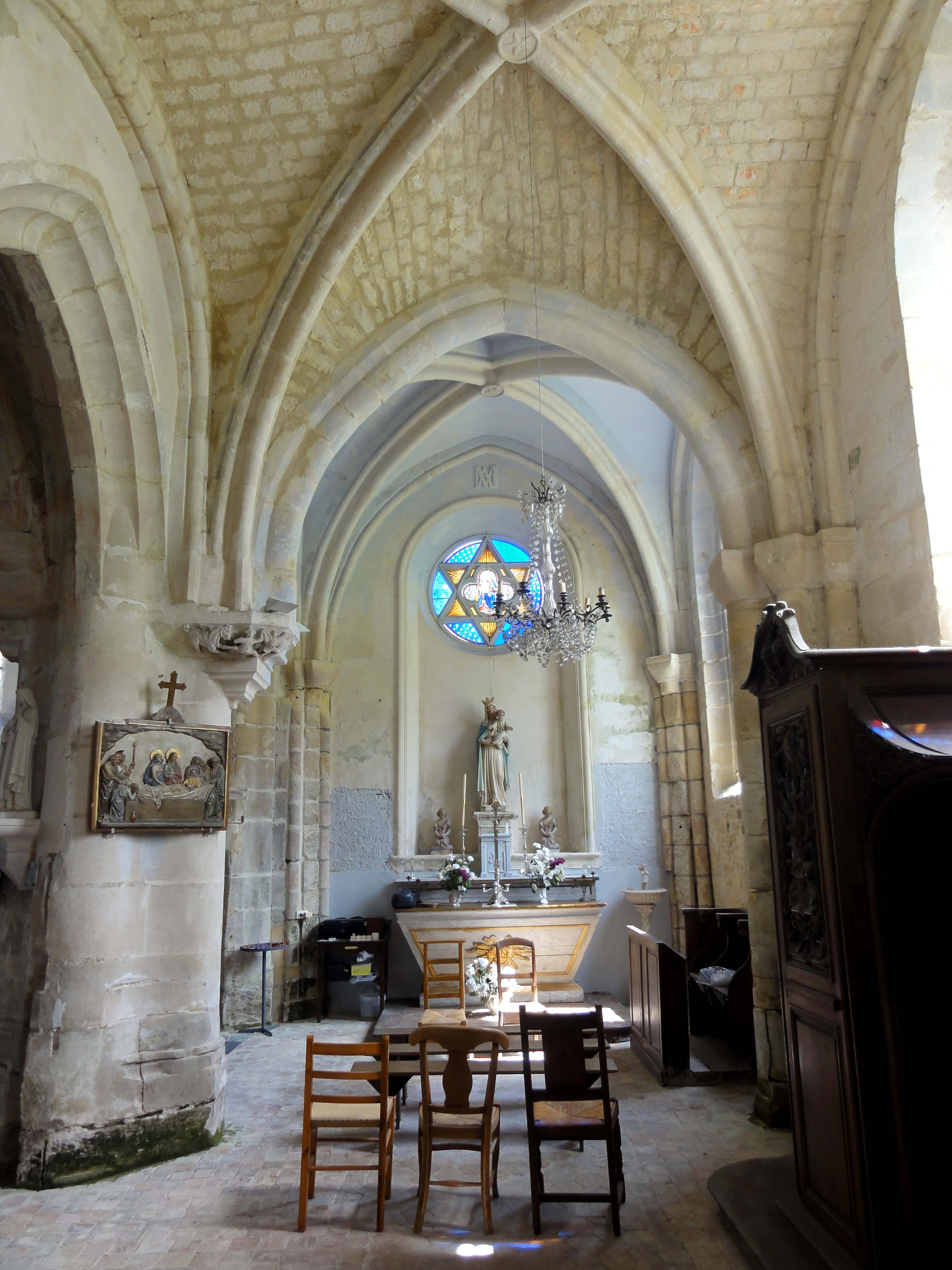 Intérieur de l'église - voir titre.